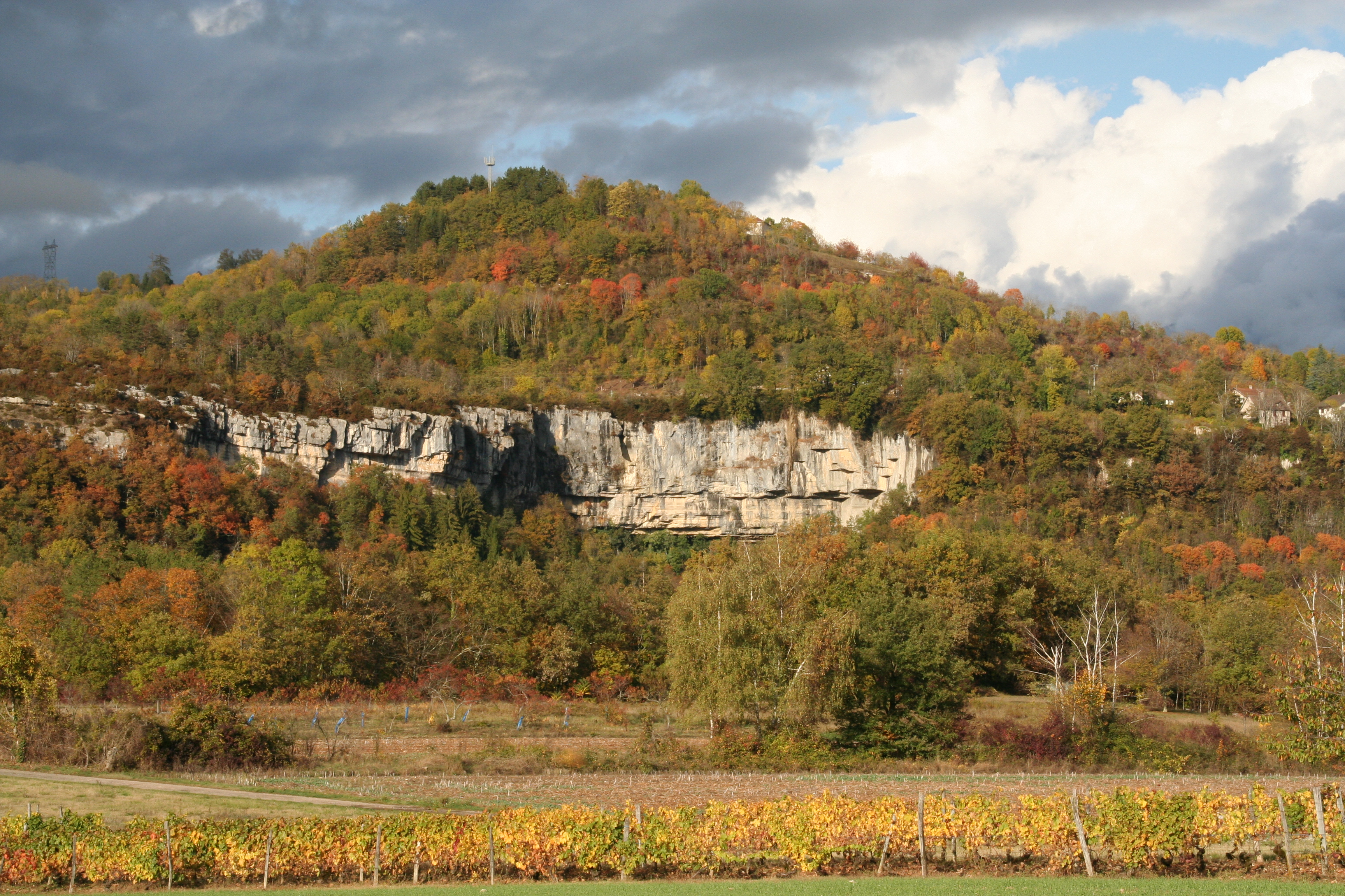 cascade de Cerveyrieu vue du plateau de Fierloz